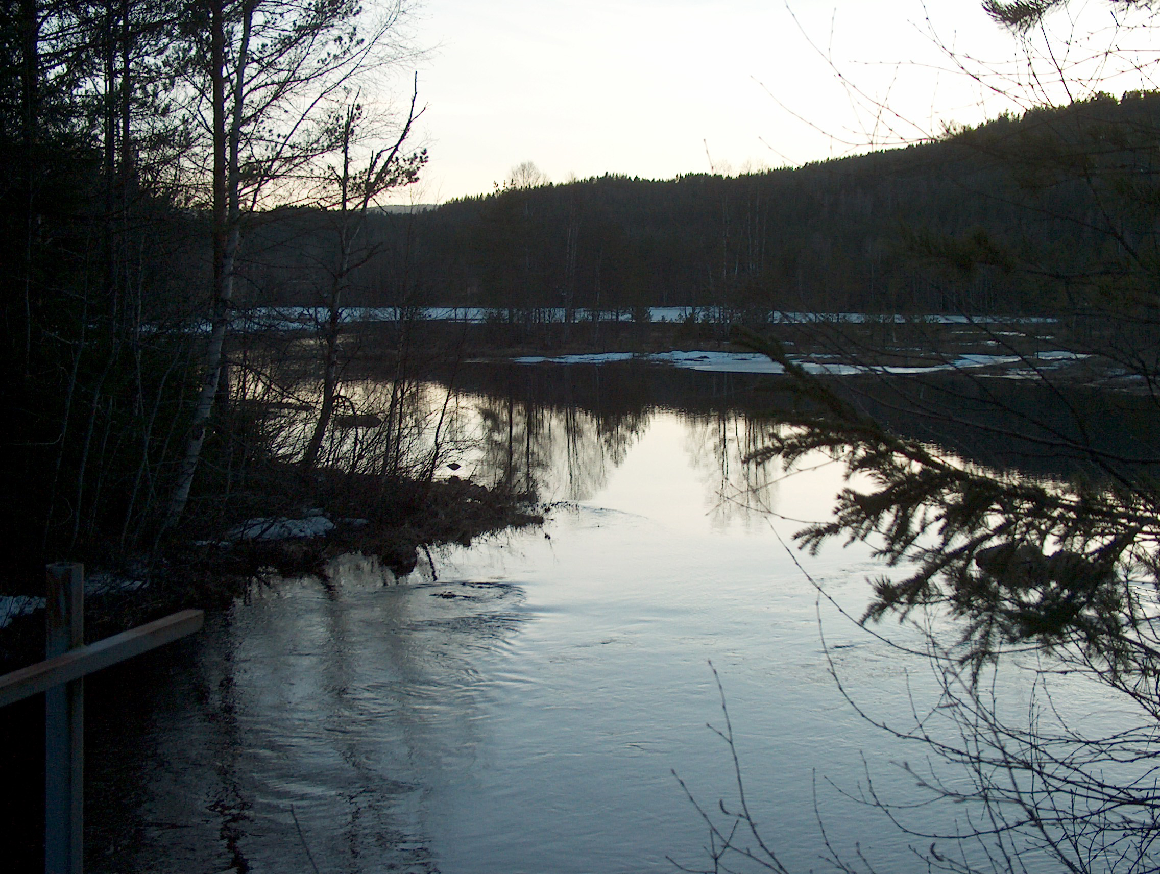 Utløpet av Bliksrudlangvannet